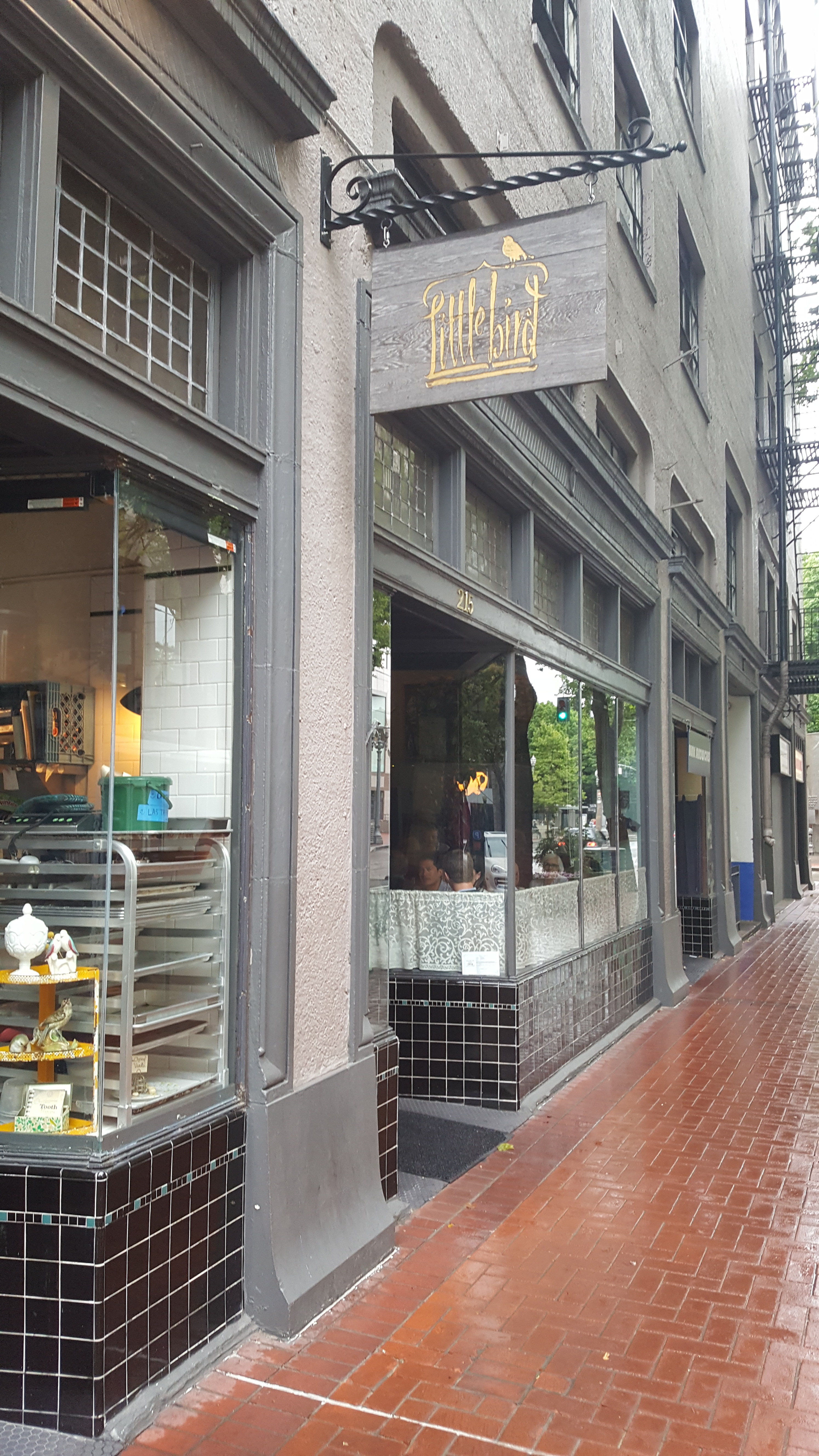 Little Bird, Portland, Oregon 2016